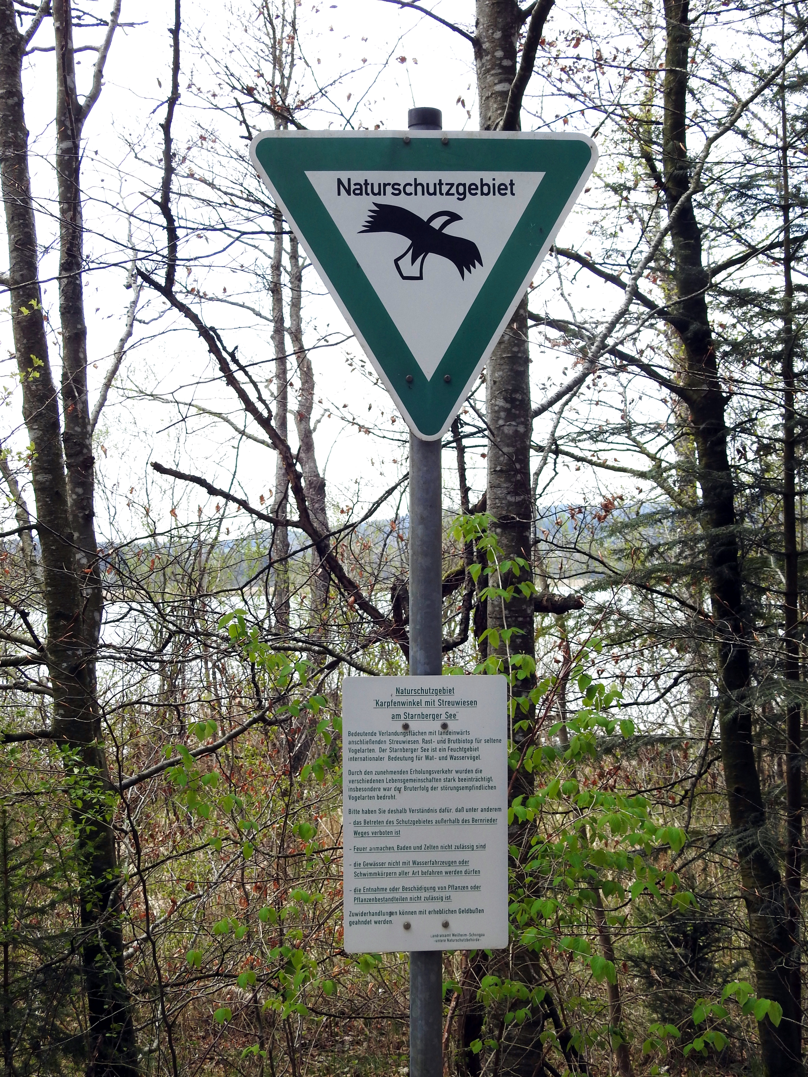 Karpfenwinkel mit Streuwiesen am Starnberger See. Naturschutzgebiet, Vogelschutzgebiet, FFH-Gebiet und Landschaftsschutzgebiet in den Gemeinden Tutzing und Bernried am Starnberger See.